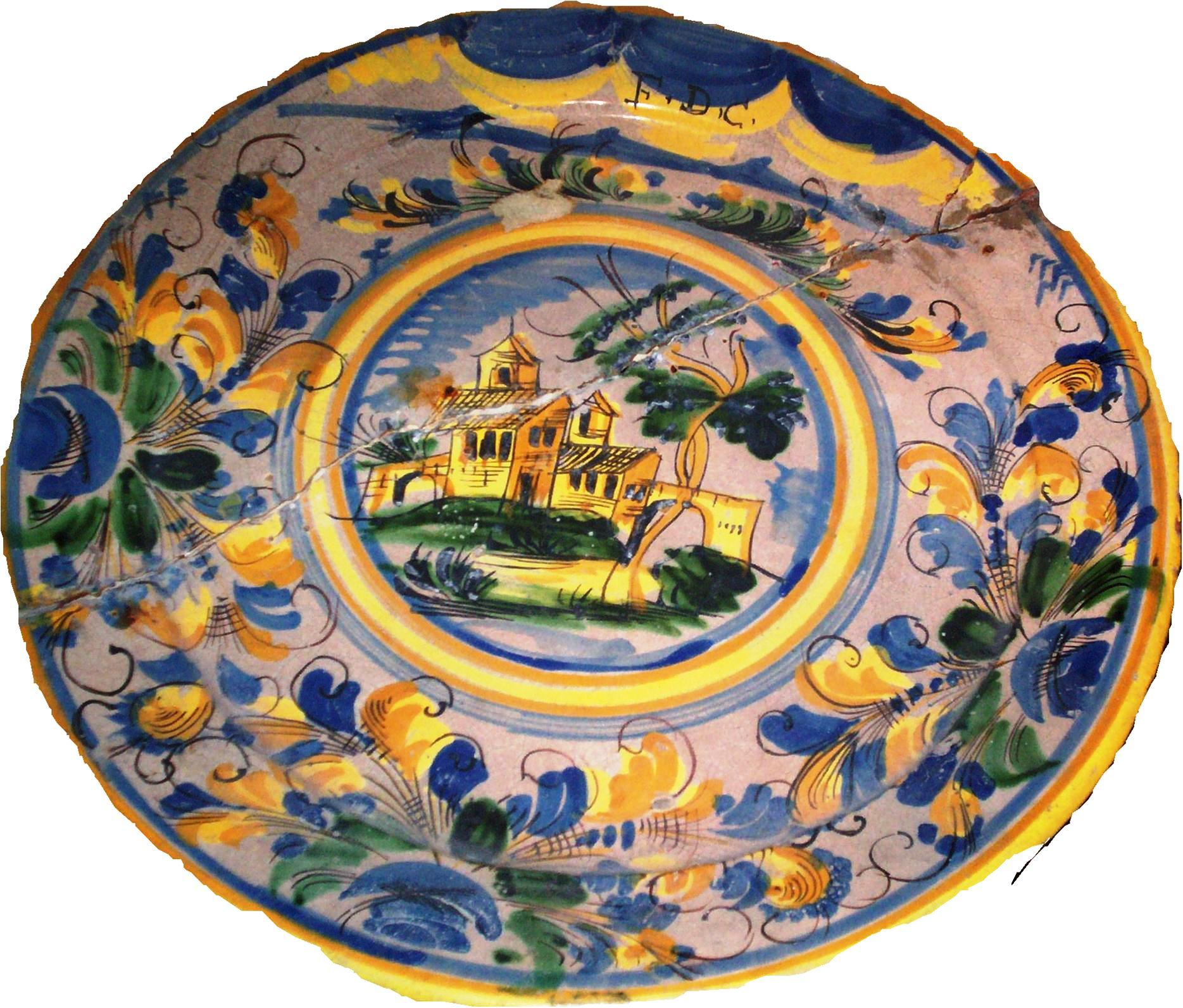 piatto con decoro paesaggistico nel museo civico di Cerreto Sannita (Bn)